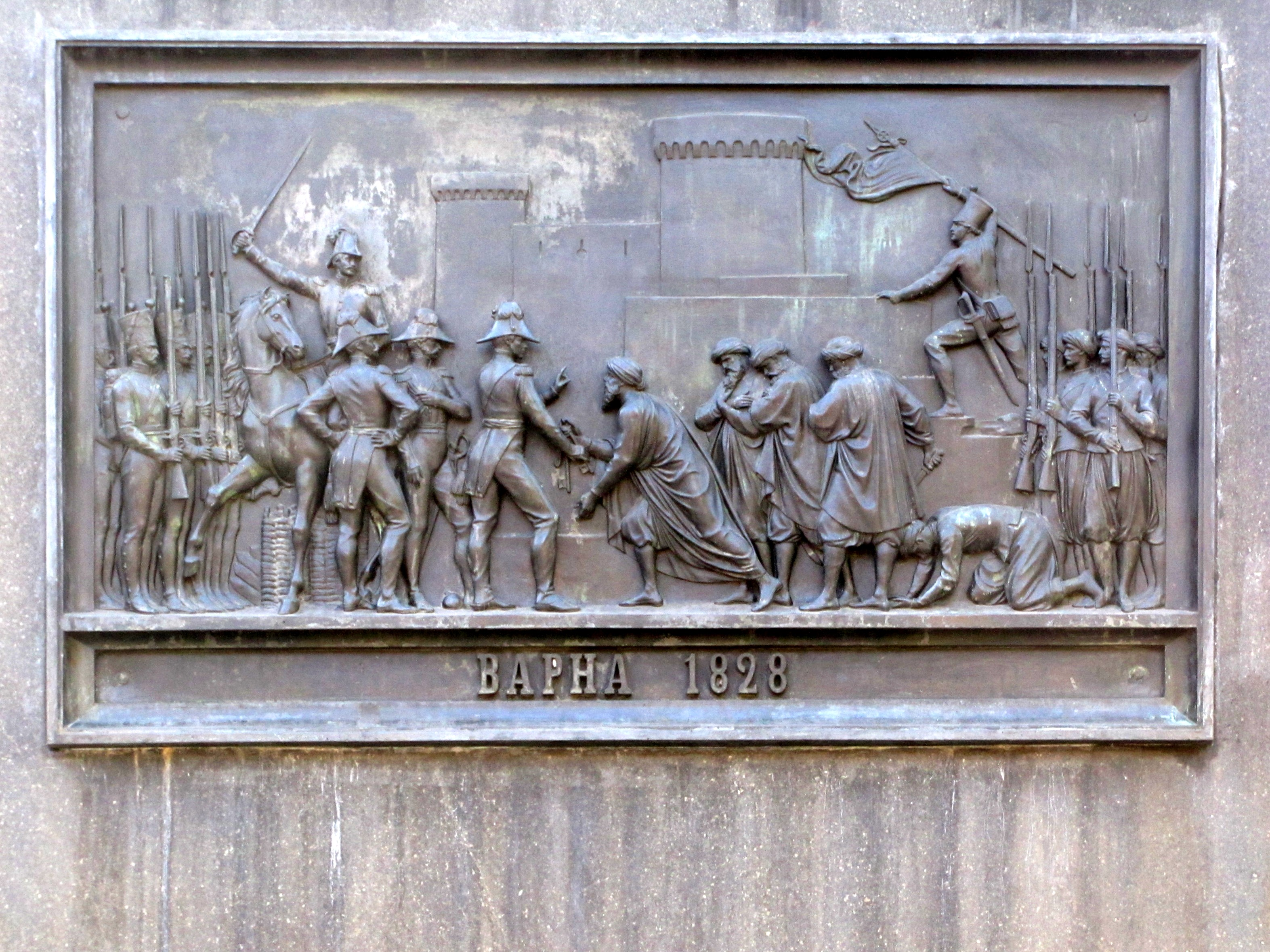 Pomník Voroncova v Oděse